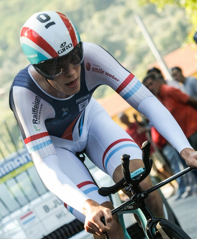 Bob Jungels en en el Campeonato Mundial de Ciclismo en Ruta 2013.